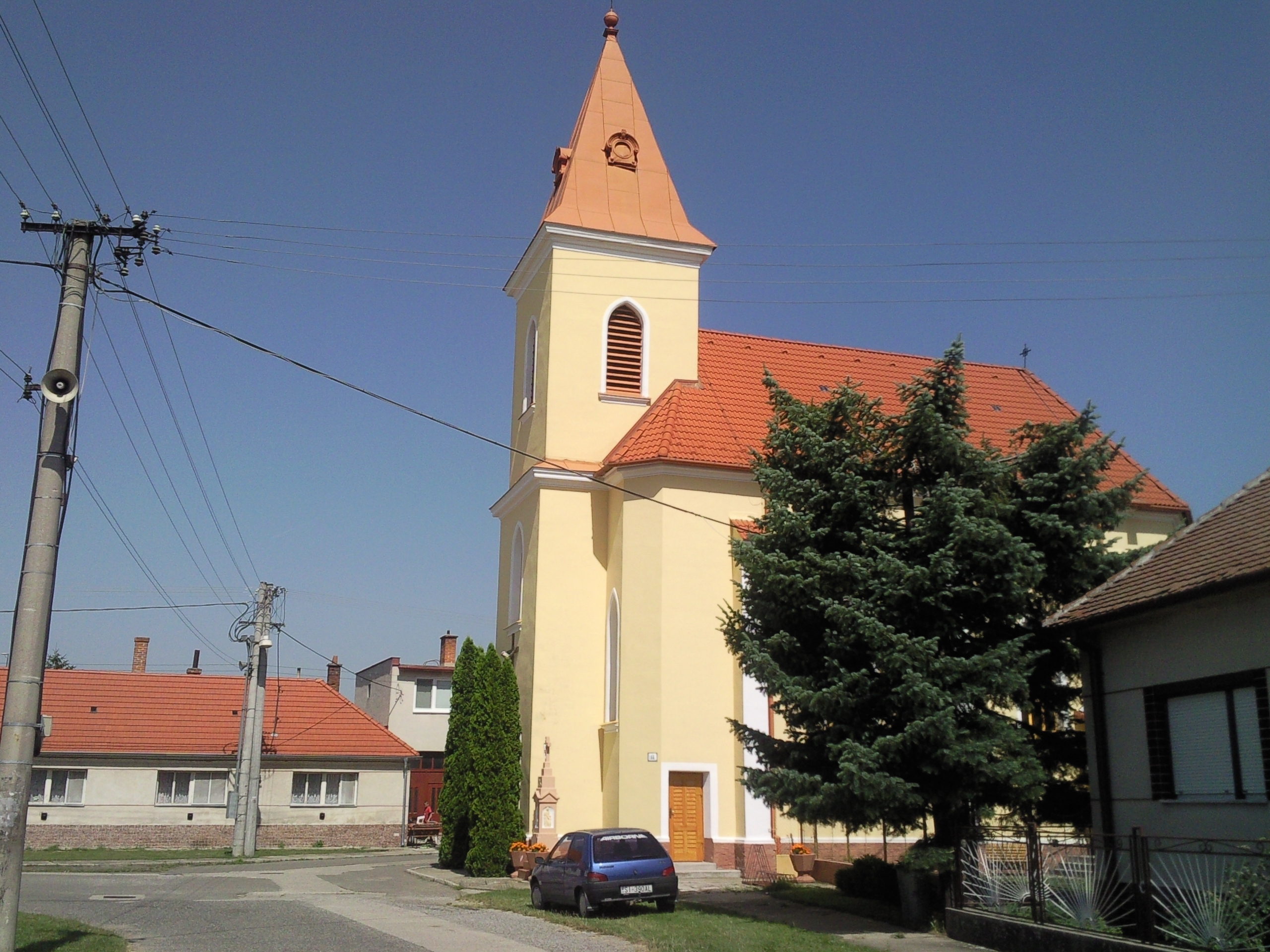 Kátov, Slovakia